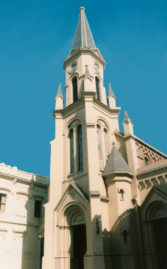 Iglesa Matriz San Ignacio de Loyola, Junín, Argentina